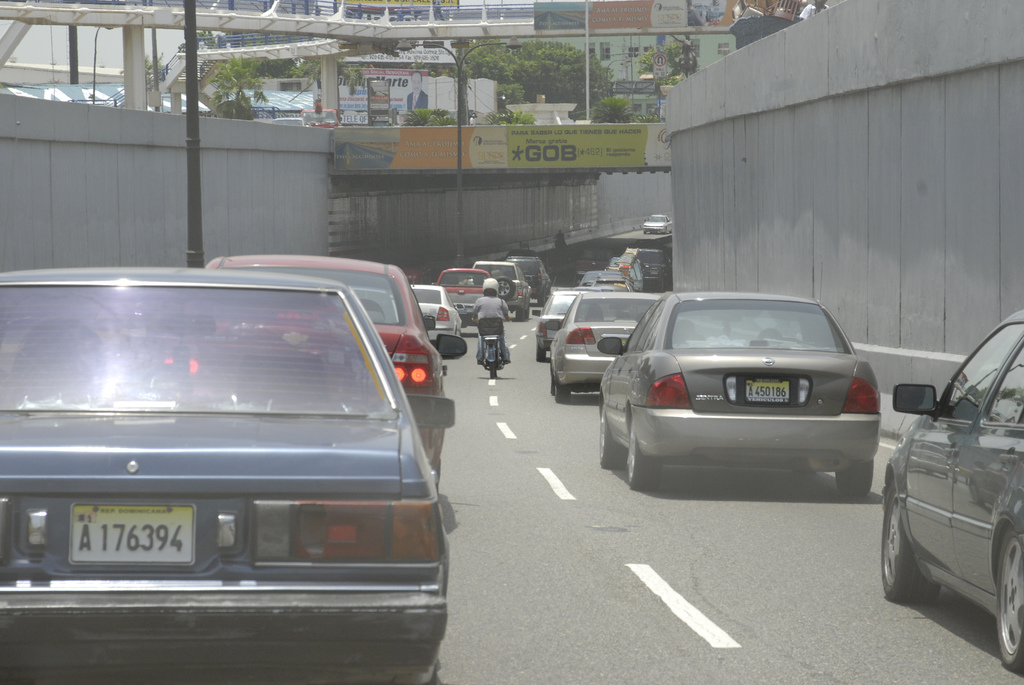 Tráfico vehícular en el desnivel de la 27 de Febrero, Santo Domingo.